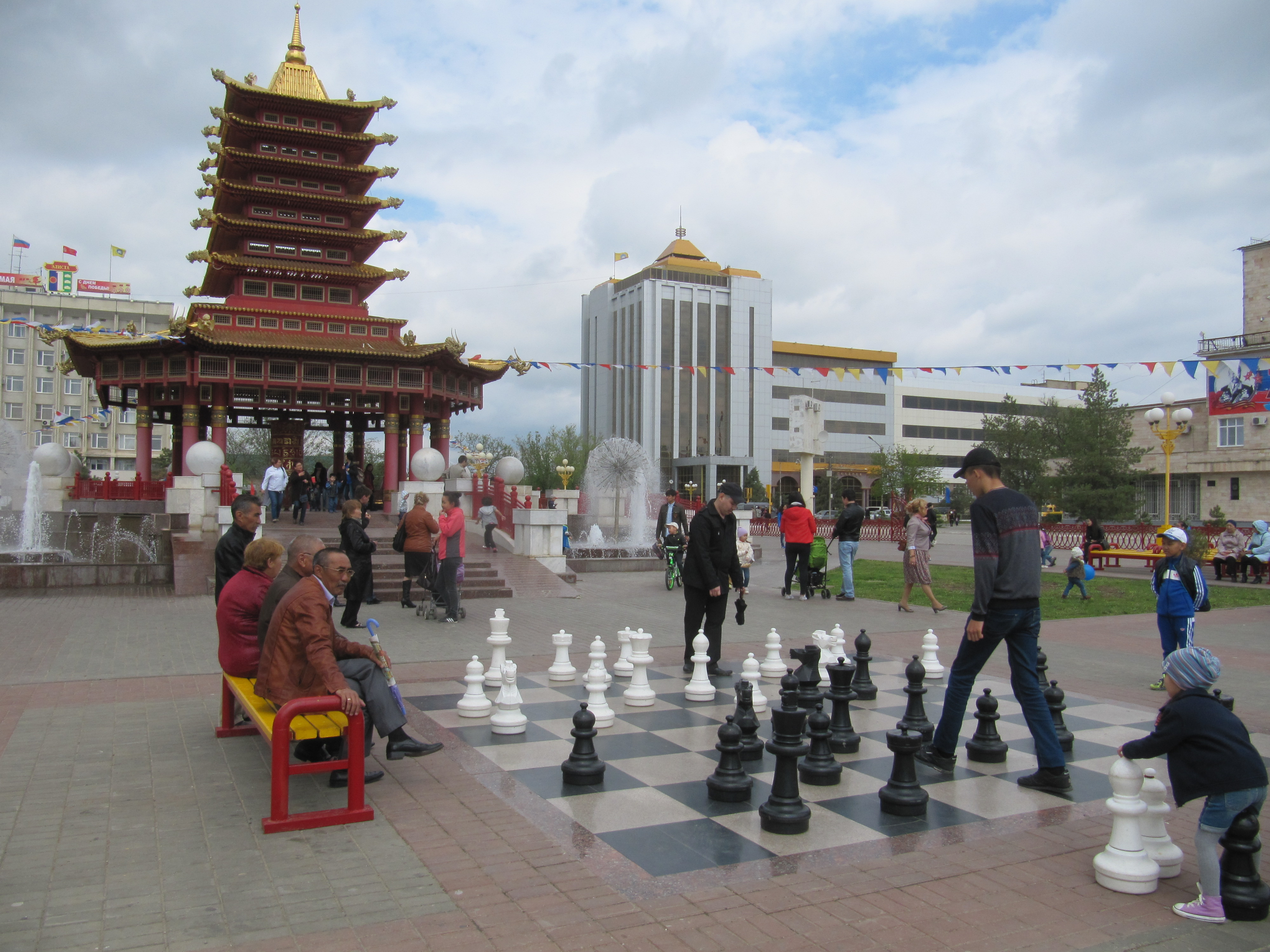 Игра в шахматы около пагоды Семи Дней в Элисте, Калмыкия